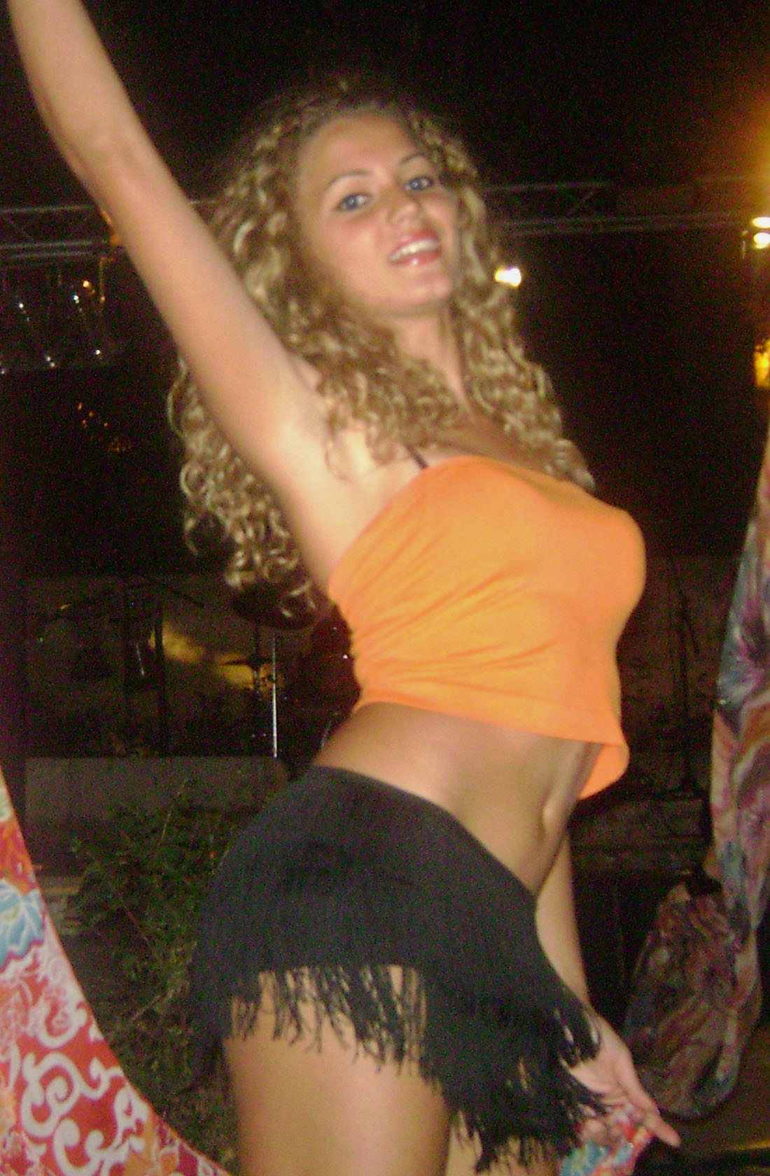 Santa Margherita di Belice, villa del Gattopardo, agosto 2010. L'attrice italiana Giusy Buscemi in un'esibizione di gruppo pubblica di danza moderna.